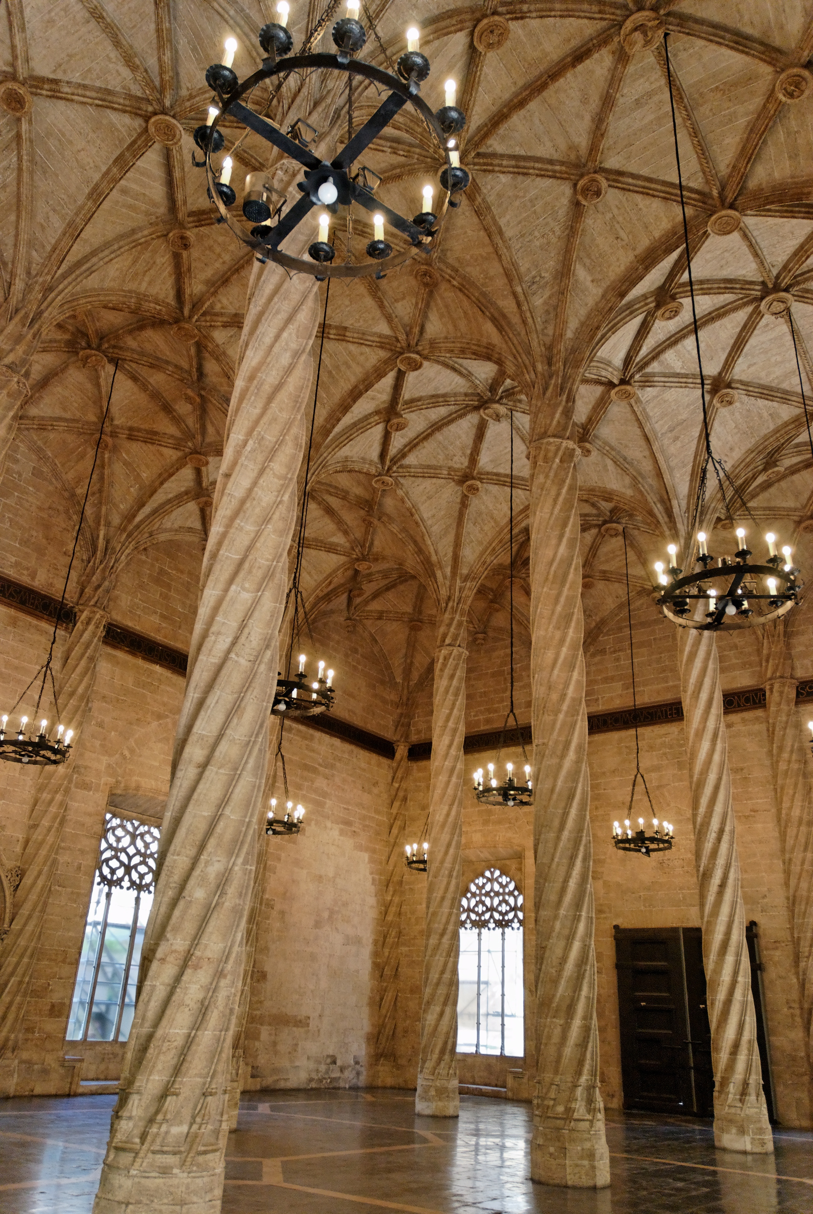 Interior de la Lonja de la Seda, en Valencia (España).